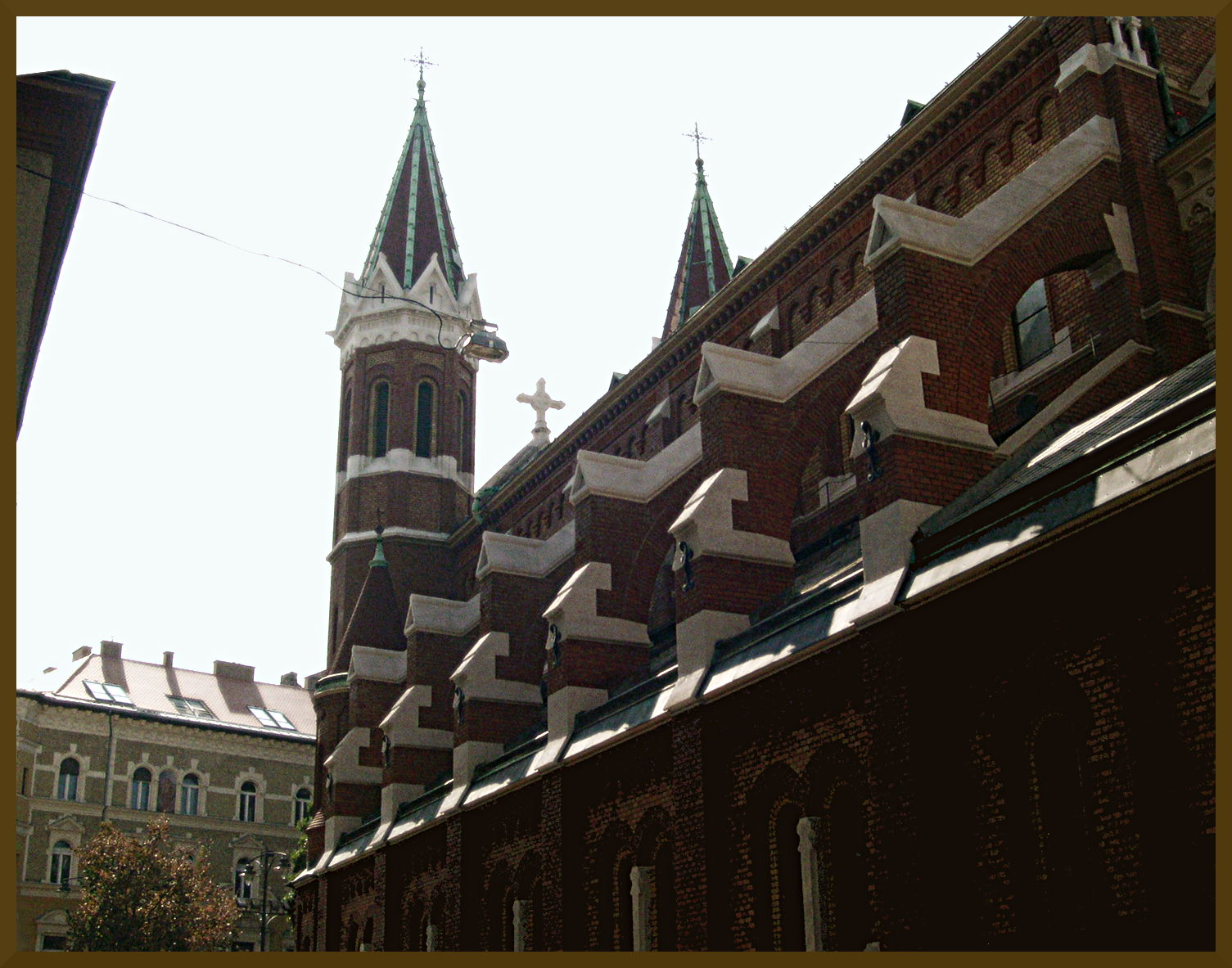 A Mária utcai Jézus Szíve Templom (Budapest, VIII. kerület, Lőrinc pap tér)